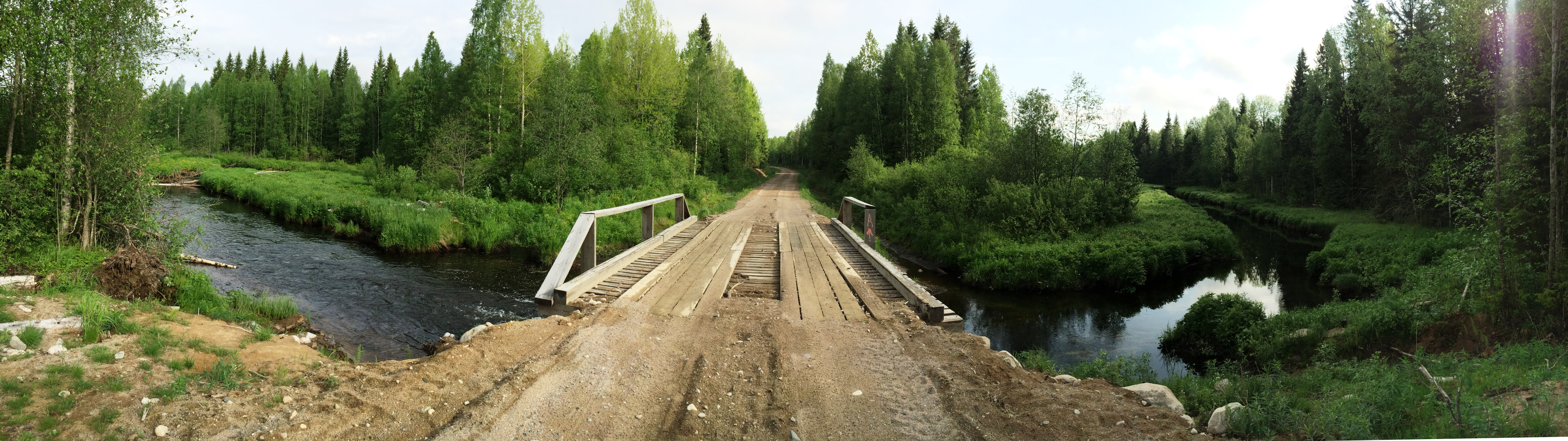 Кура (приток Видлицы)